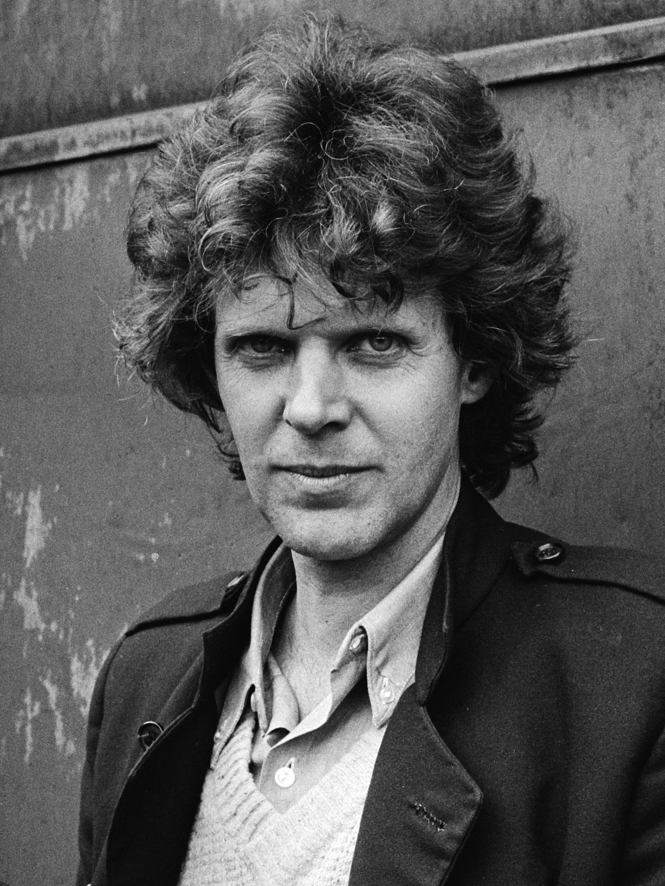 Persconferentie Holland Festival (Rotterdam); Rudi van Dantzig 18 april 1979